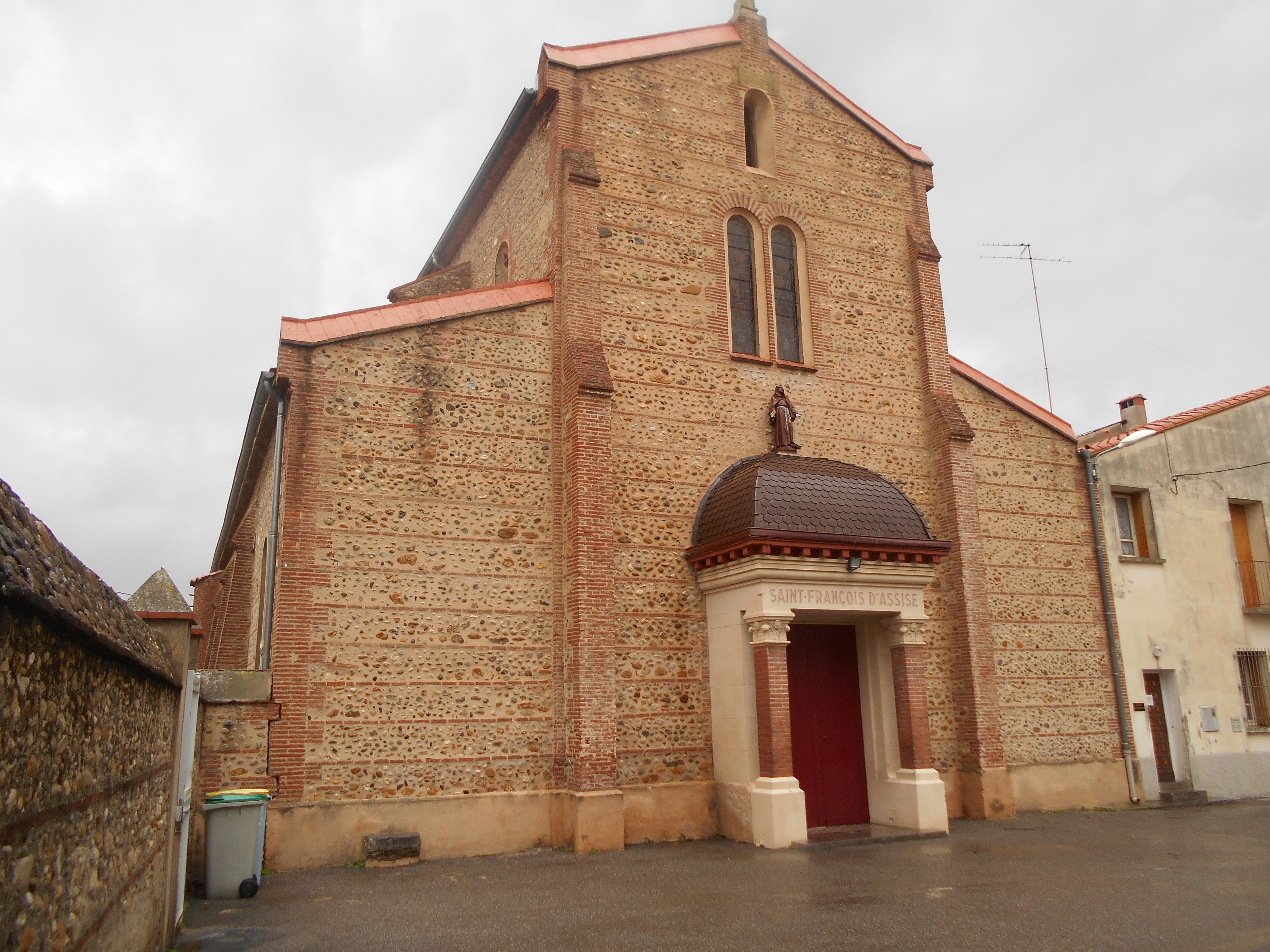 L'església parroquial de Sant Lluís Gonzaga de Perpinyà, al Baix Vernet